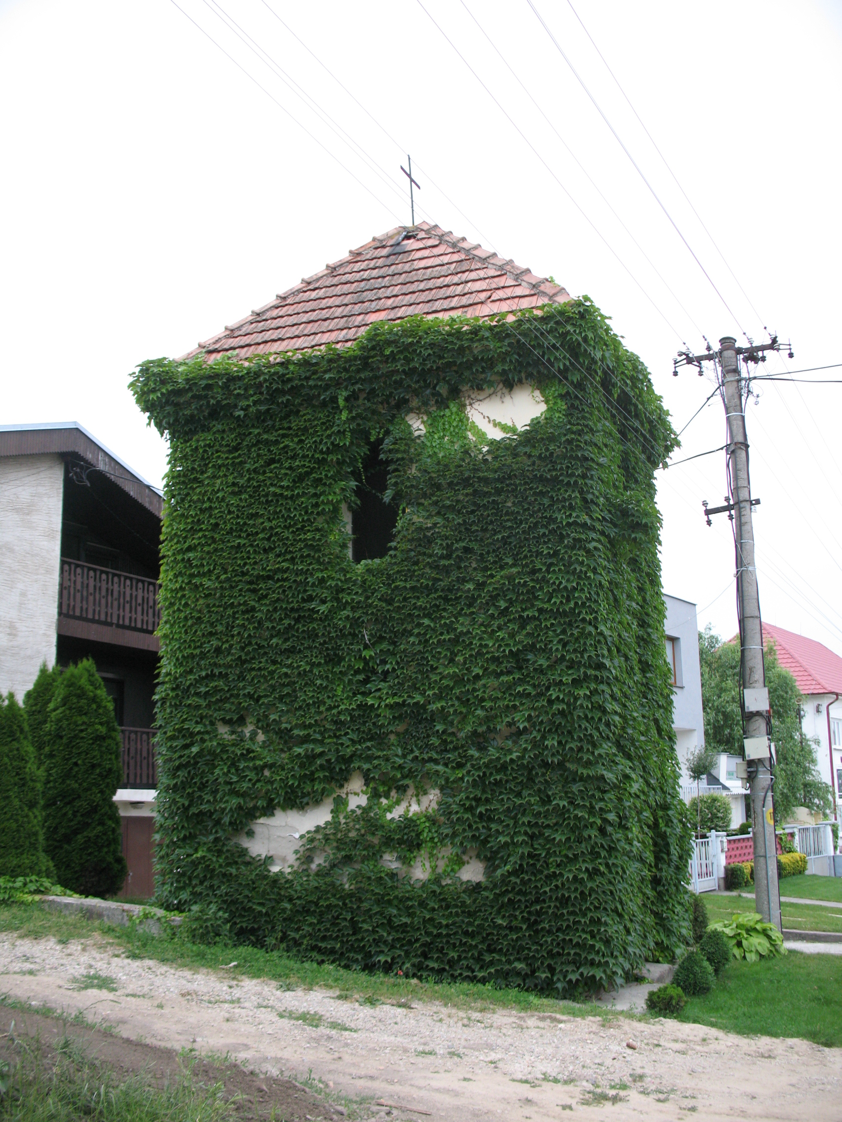 Nemeskürt